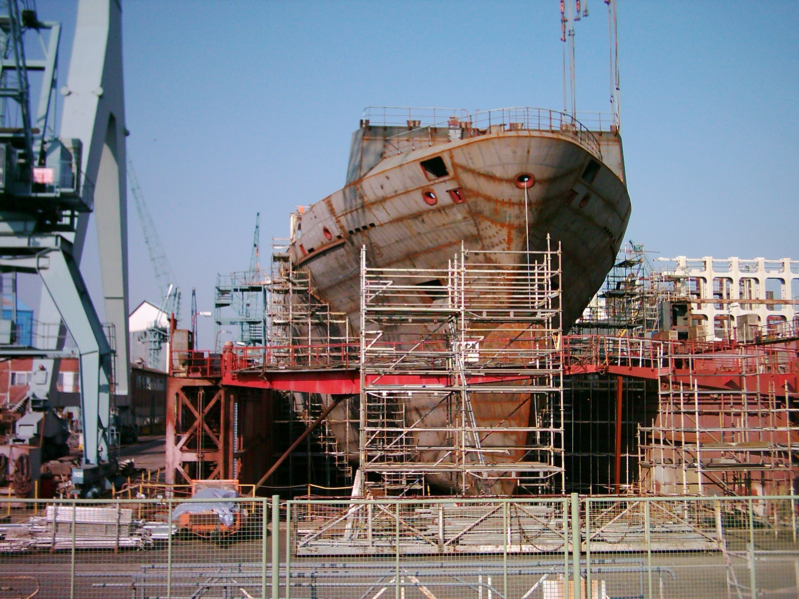 Bau eine Schiffs auf der Sietas-Werft (J.J. Sietas) in Hamburg-Neuenfelde.